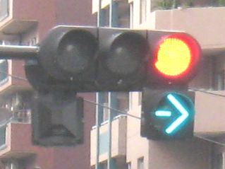 右折可の青信号